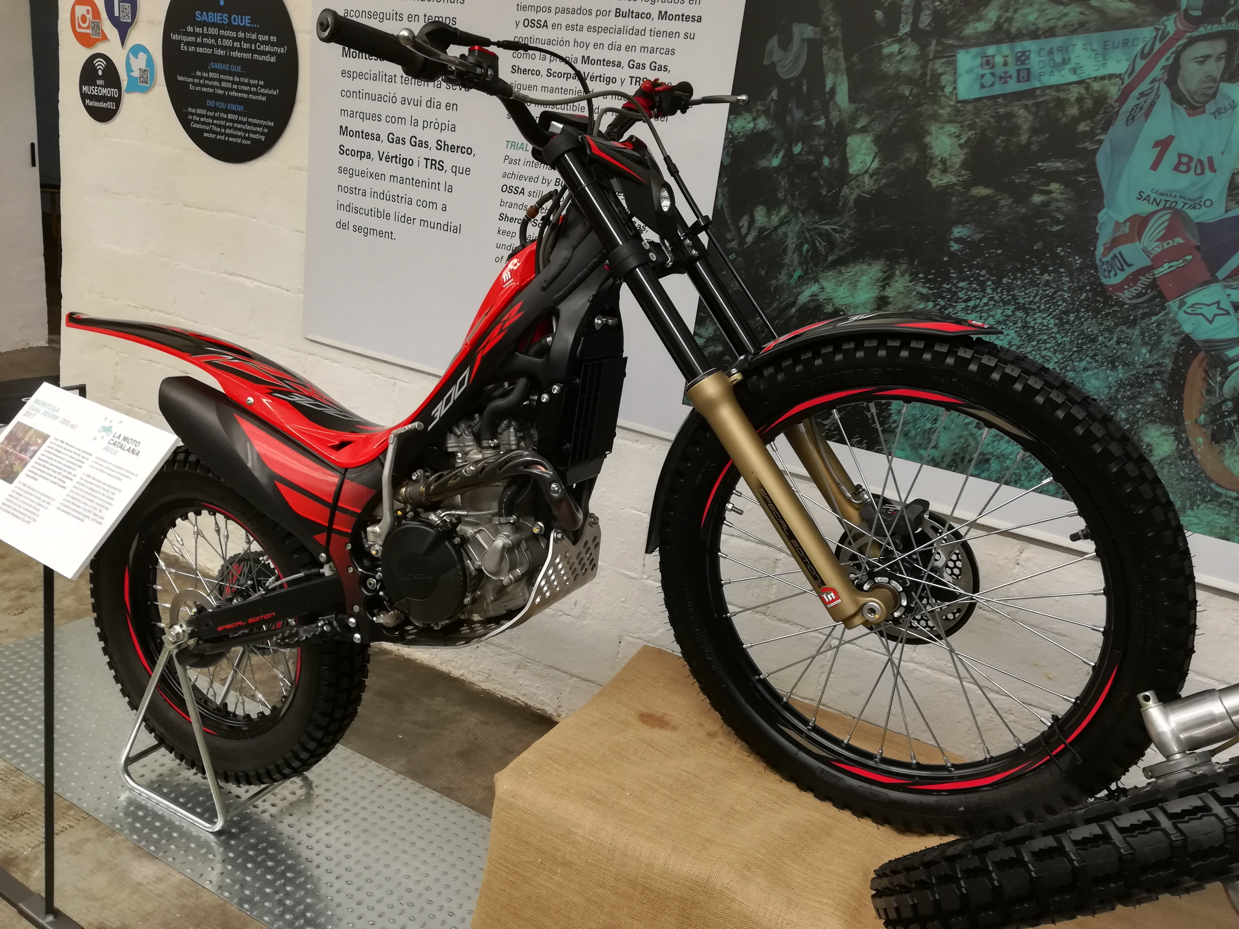 Montesa Cota 300RR, 300cc (2017)